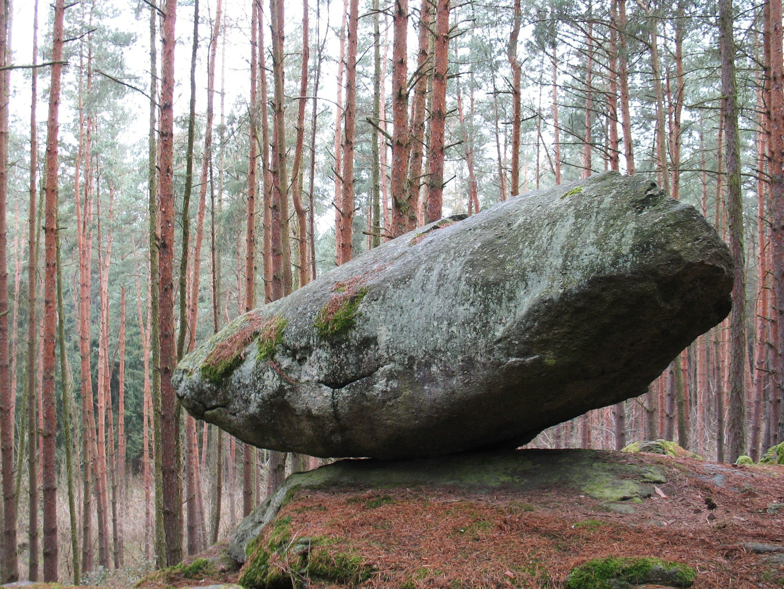 Viklan Vindiš u Krásné Hory nad Vltavou